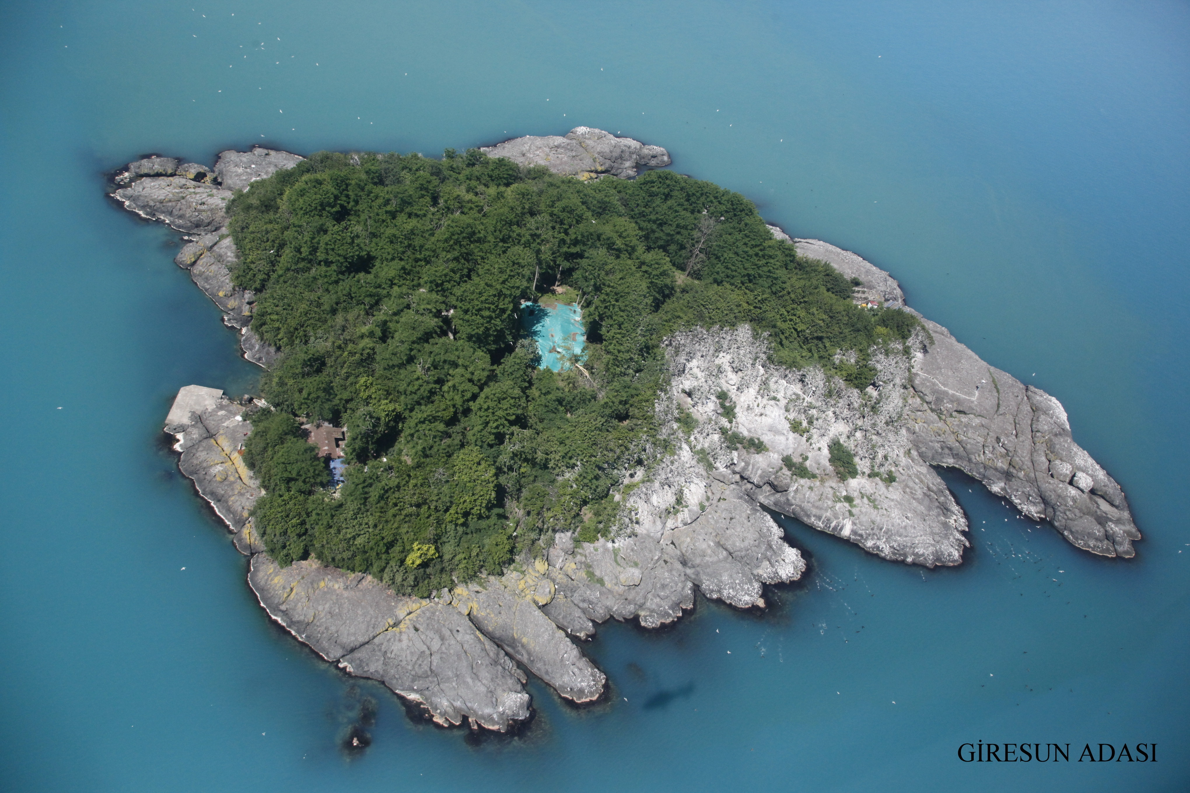 Do¤u Pontus bölgesinin önemli yerleflimlerinden biri olan antik Kerasous (Giresun) kentinin 1.7 km. aç›¤›nda bulunan Aretias adas›, Do¤u Karadeniz'de antik dönemde ve ortaça¤da yerleflime sahne olmufl tek adad›r. Ada yaklafl›k 40.000 mÇ yüzölçümüne sahiptir. Denizden en yüksek noktas› 24.5 m. olan ada üzerinde klasik döneme ve ortaça¤a ait kal›nt›lar bulunmaktad›r. Antik kaynaklar adaya, Grek döneminde ‘Ares’, Roma ‹mparatorluk döneminde ‘Khalkeritis’ adas› denildi¤ini; Pharnakeia’n›n hemen karfl›s›nda yer ald›¤›n›; Ares’e adanm›fl bir tap›nak oldu¤unu ve Amazonlar›n burada siyah bir tafla (flimdiki Hamzatafl›) tap›nd›¤›n› bildirmektedir. Ada surlar›n›n, Trabzon Pontus ‹mparatoru Alexius II Komnenos (1297- 1330) Dönemi’nde infla edildi¤i bilinmektedir. Türklerin adaya ilk kez 1368 y›l›nda ç›kt›¤› bilinmektedir. Osmanl› hâkimiyeti boyunca Giresun Adas›, her türlü Osmanl›-Rus mücadelesi s›ras›nda stratejik konumu ile önem kazanm›flt›r. 1806- 1812 Osmanl›-Rus Savafl› s›ras›nda Giresun kent surlar› ve adan›n surlar› güçlendirilmifltir. 2009 y›l›nda bafllat›lan sistematik ve periyodik araflt›rmalar ve 2011 y›l›nda bafllat›lan kaz› çal›flmalar› sonucunda adada yer alan yap›lardan baz›lar› k›smen ortaya ç›kar›lm›flt›r. Surlarla çevrili olan adada ortaça¤ yerleflimine ait tap›nak üzerine infla edilmifl kilise, kule/yönetici yap›s›, flapel ve sarn›ç gibi yap›larla birlikte Klasik ve Helenistik döneme ait liman sahas›, basamakl› altar ve sunu çukurlar› tespit edilmifltir. Ada, kayal›k k›y› fleridinin hemen ard›ndan oldukça güçlü bir sur ile tümüyle çevrelenmifltir. Surlar yaklafl›k 600 m. uzunlu¤ unda, ortalama 6 m. yüksekli¤inde ve yaklafl›k 0.9 m. enindedir. Sur yap›s›n›n toplamda 150 metrelik bölümü yer yer y›k›lm›fl ve yaklafl›k 450 metrelik bölümü k›smen korunarak günümüze ulaşabilmiştir.